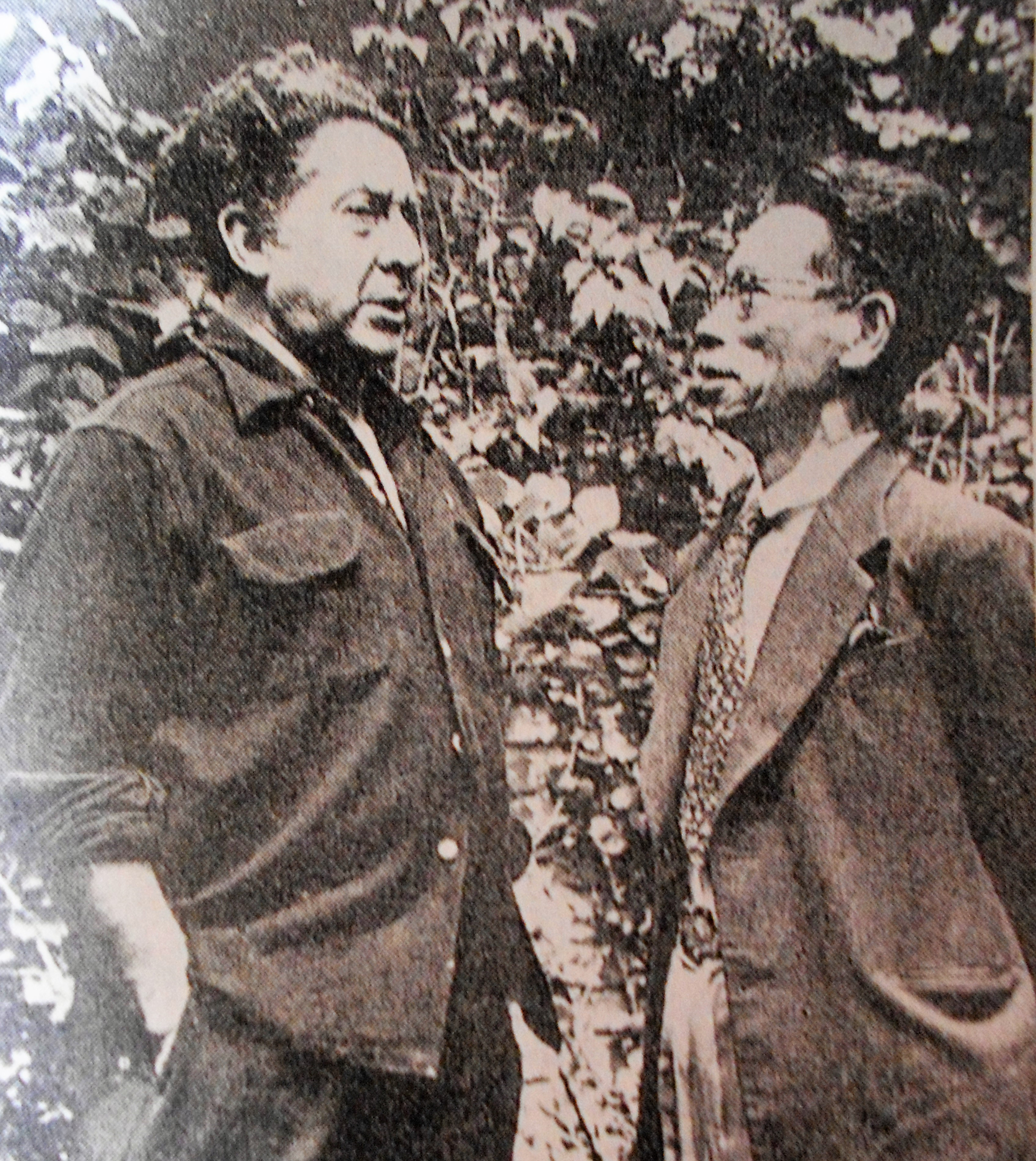 ダビド・アルファロ・シケイロス（左）と北川民次（右）。